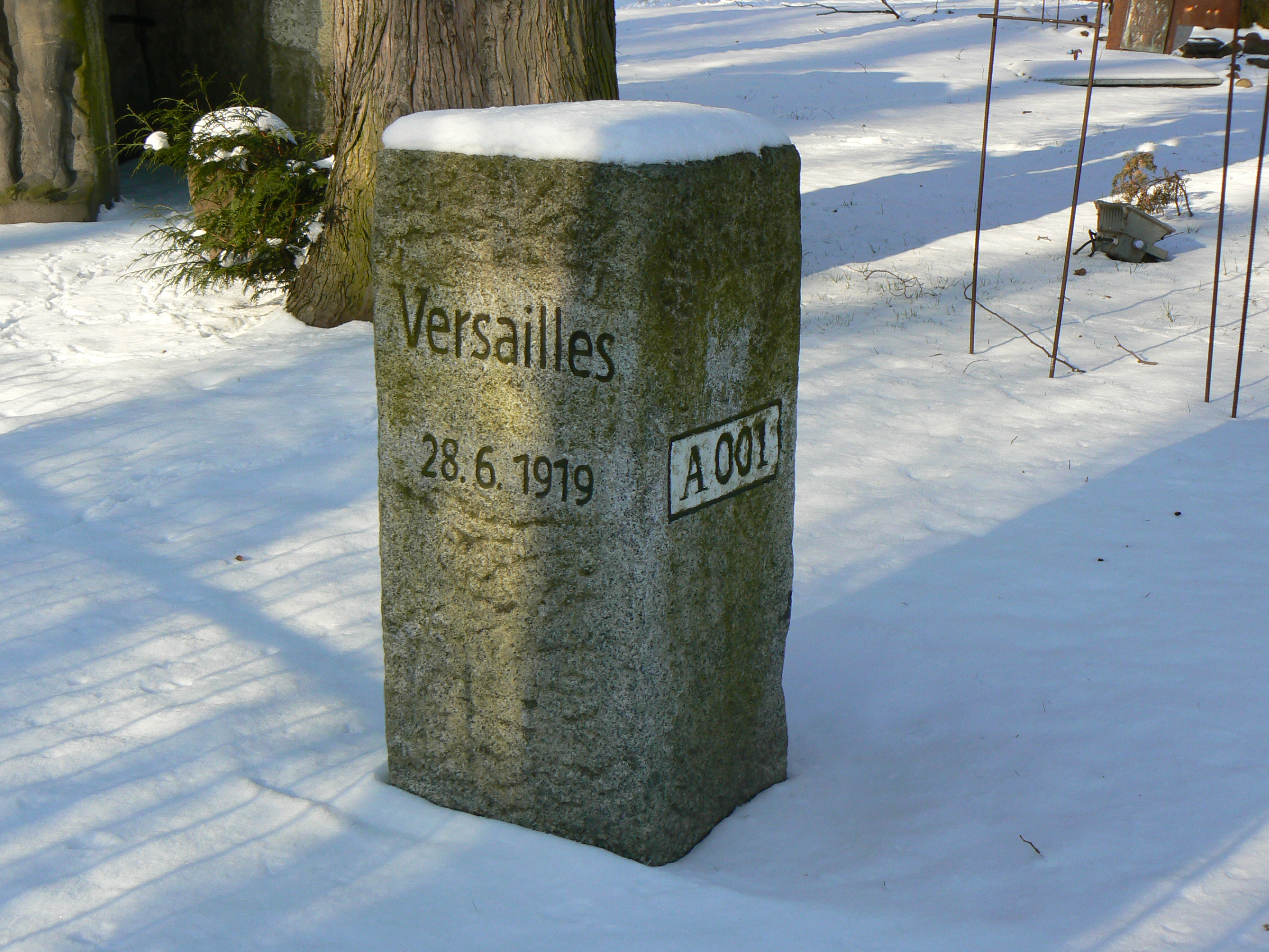 Replika słupka granicznego, jakimi do czasów II wojny światowej oznaczano przebieg granicy pomiędzy Polską a Wolnym Miastem Gdańskiem, znajdujący się na zapleczu Zespołu Szkół Plastycznych w Gdyni Orłowie.